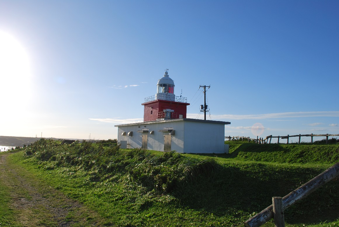 北海道厚岸郡浜中町霧多布岬にある湯拂岬灯台。2010年夏公開の映画「ハナミズキ」のロケ地。